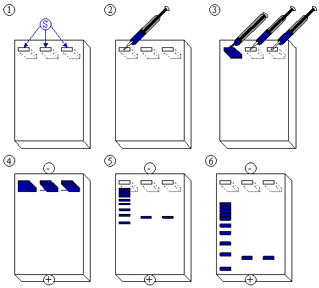 Erstellt von Magnus Manske, Lizenz : Public Domain 14:45, 18. Feb 2003 Magnus Manske 465 x 420 (3.587 Byte) (Von en (ursprünglich von mir:-))